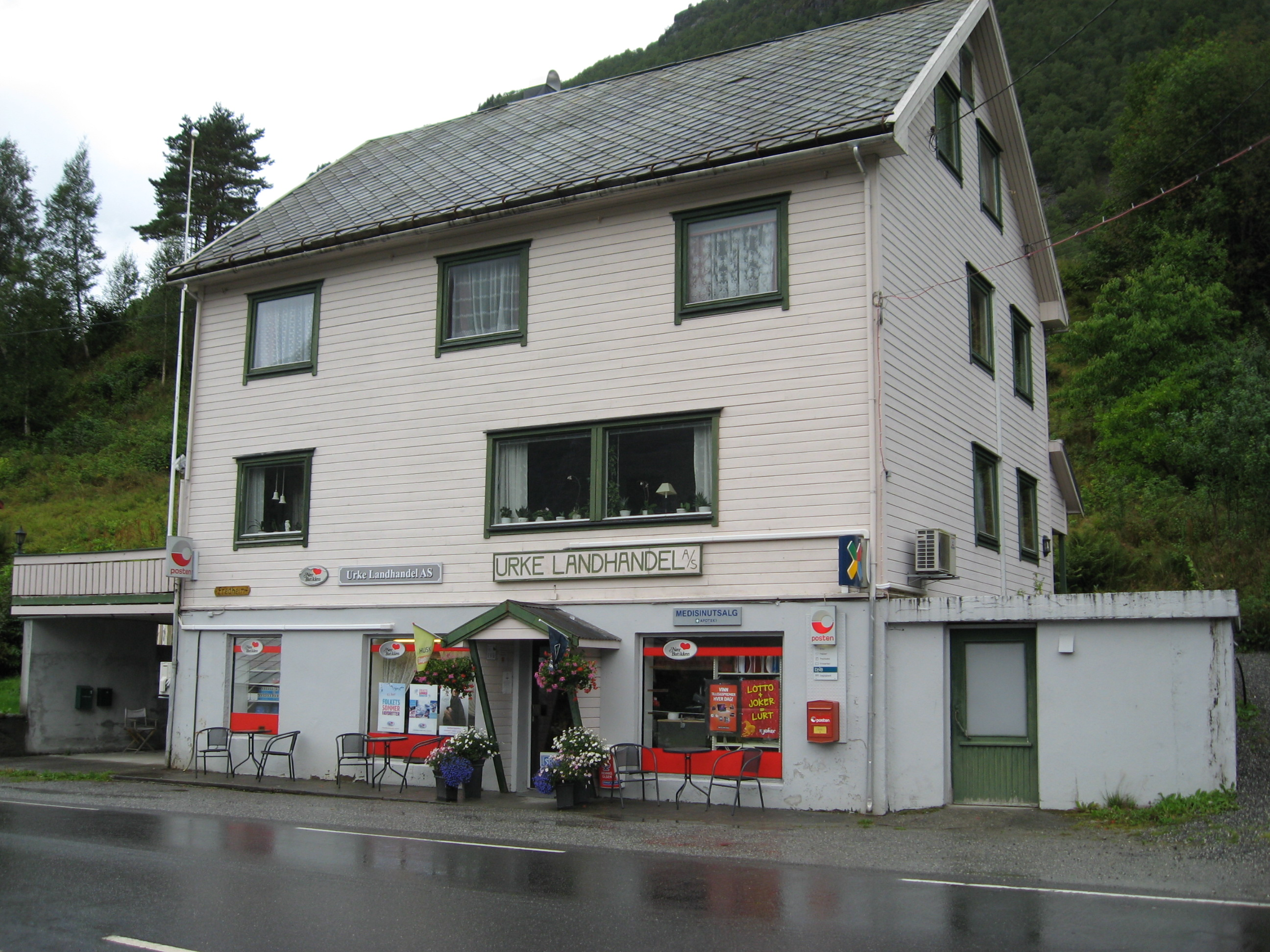 Urke-Kallabuda 2012